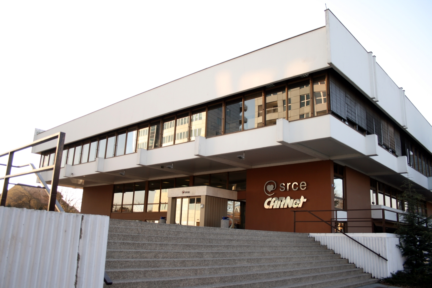 Zgrada Srca i Carneta u Zagrebu, Hrvatska